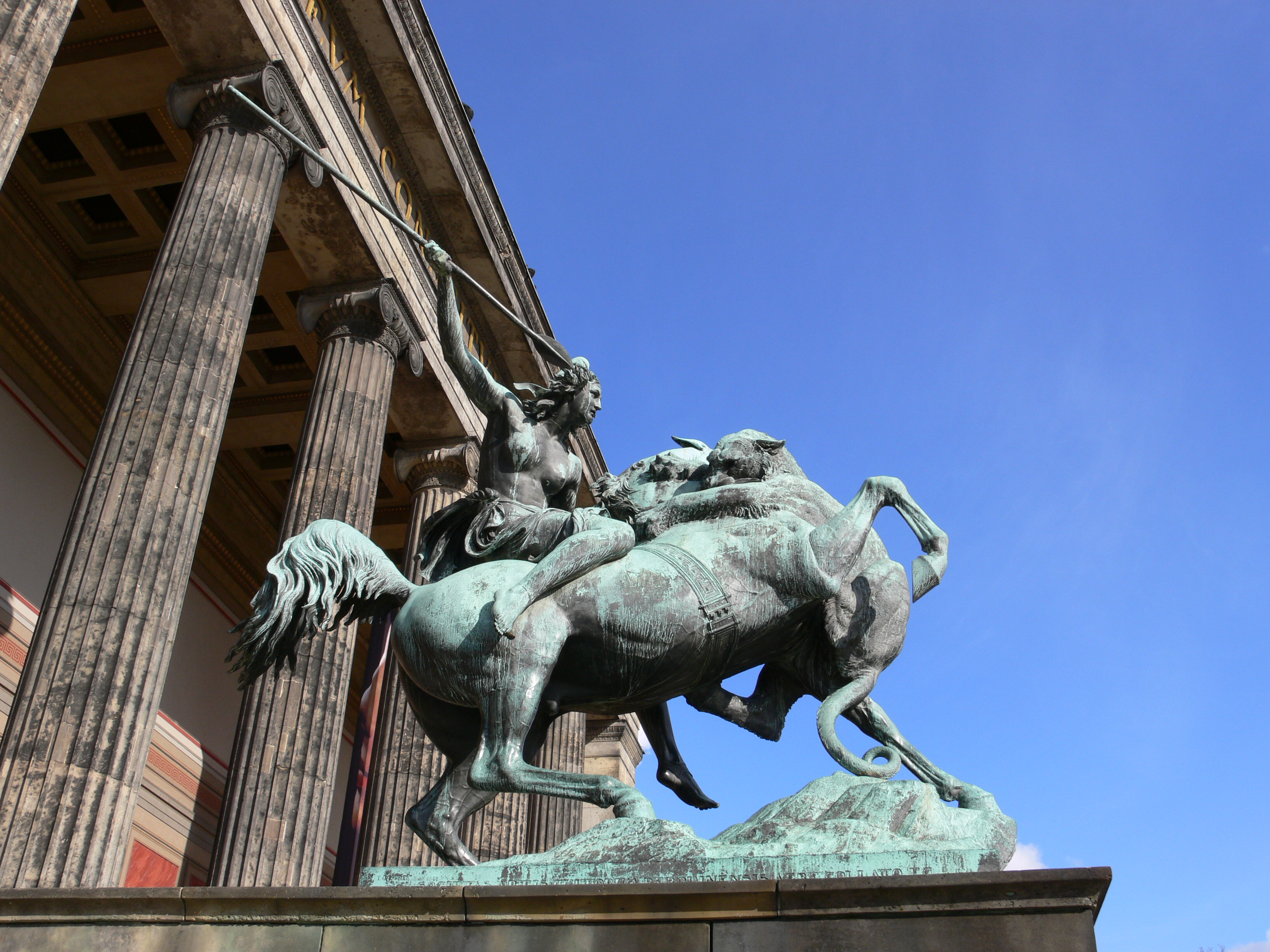 Kämpfende Amazone von August Kiss, Statue am Alten Museum, Berlin